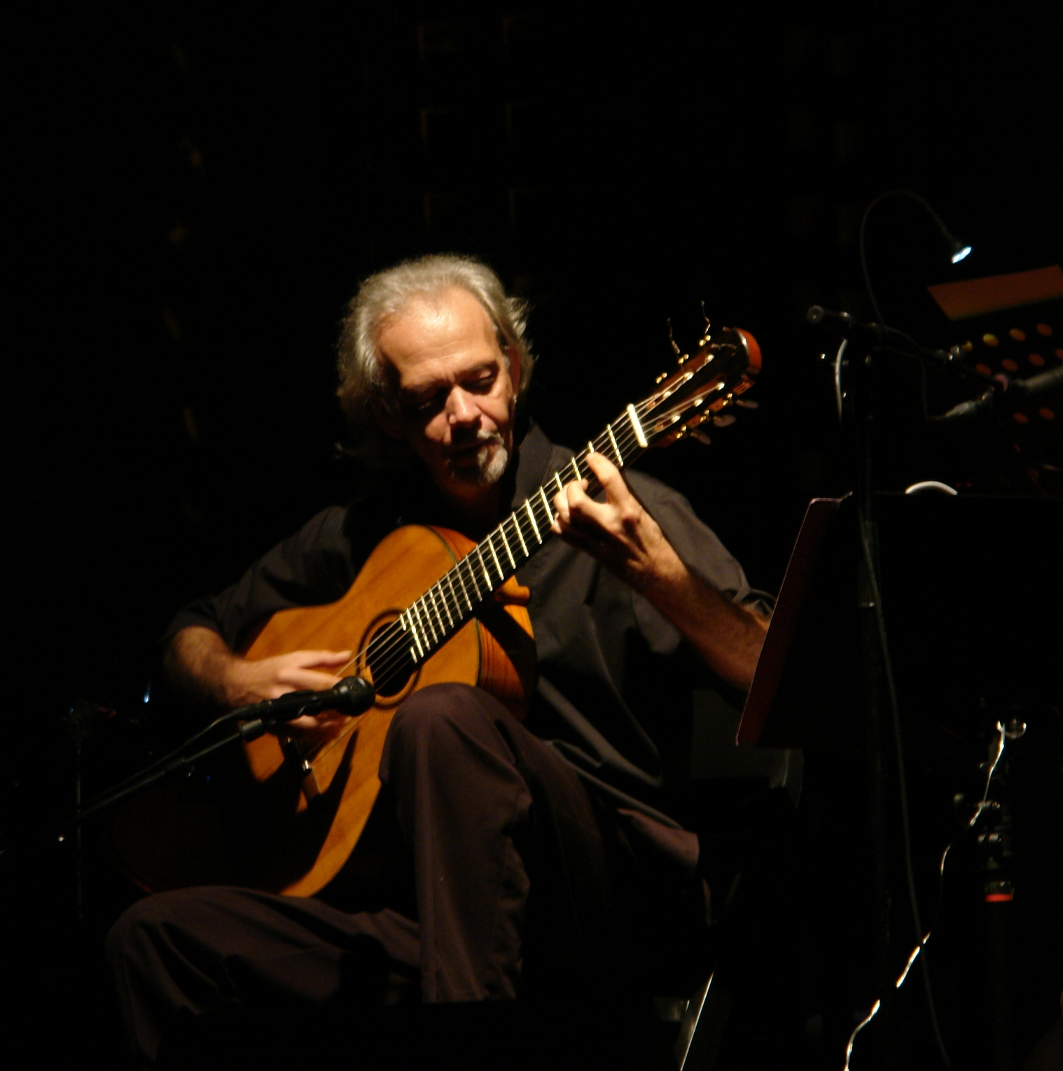 Anthony Glise, Nuits de Hautecombe 2008, Savoie, France.